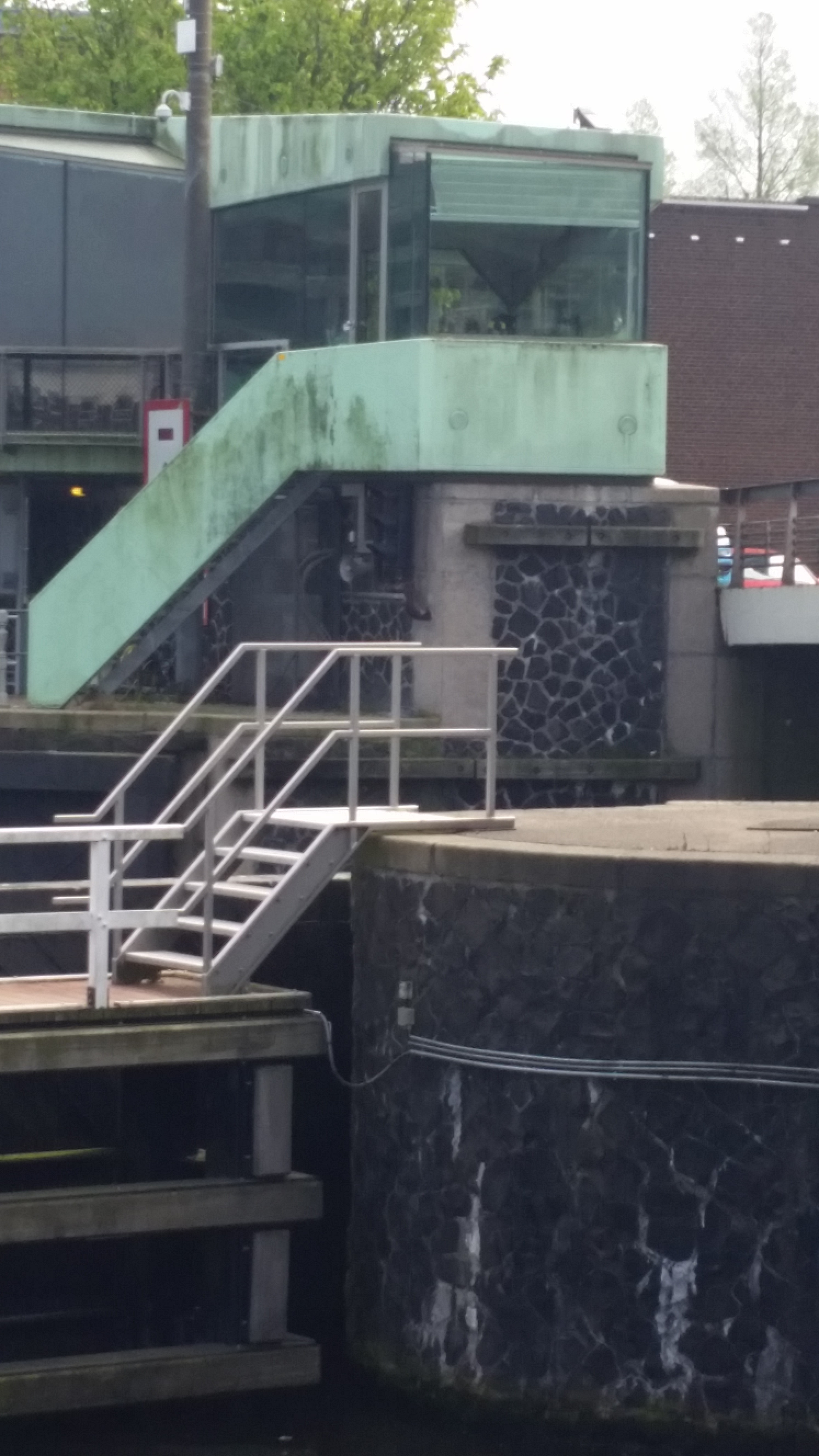 Brugwachtershuis van brug 346